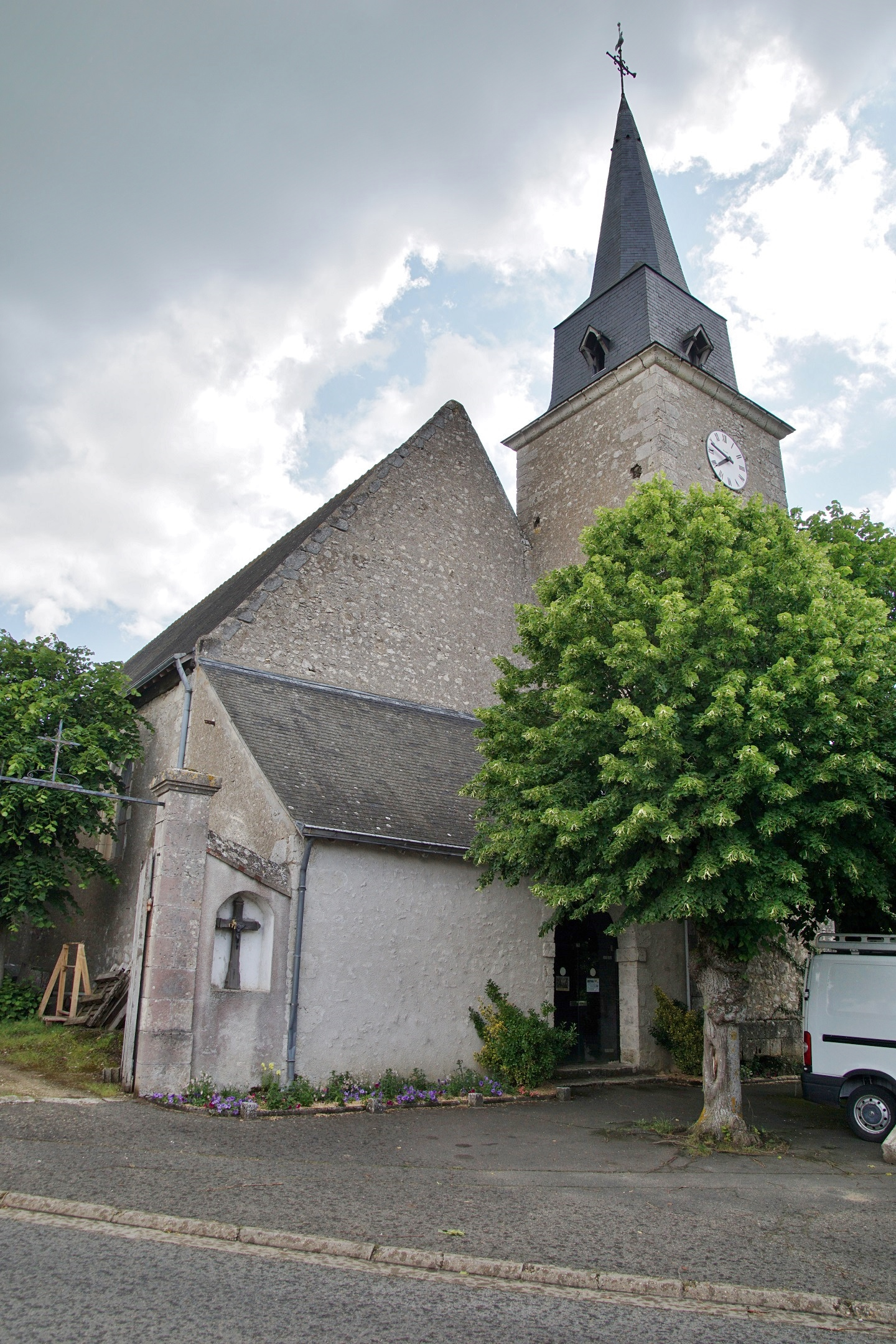 Loir et Cher